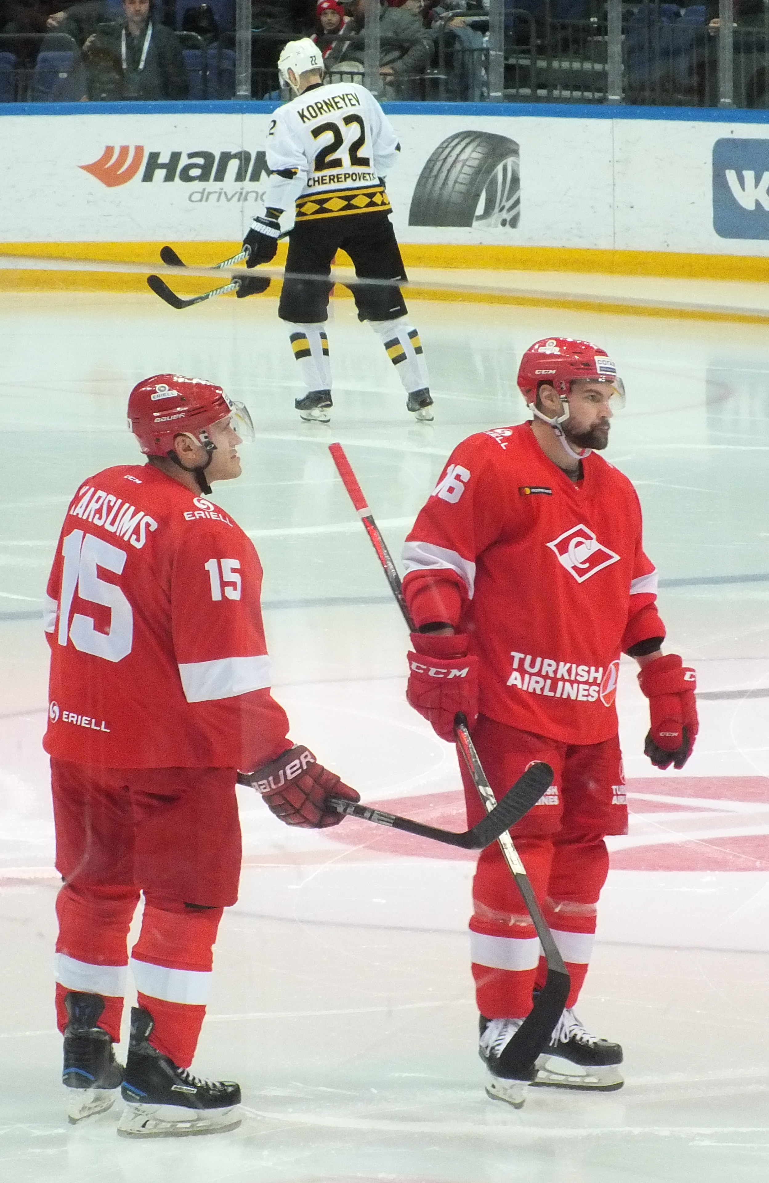 Каспарс Даугавиньш (справа) и Мартиньш Карсумс (слева) — игроки хоккейного клуба «Спартак (Москва)»